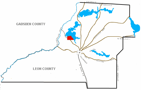 Map of Casa de Laga Plantation